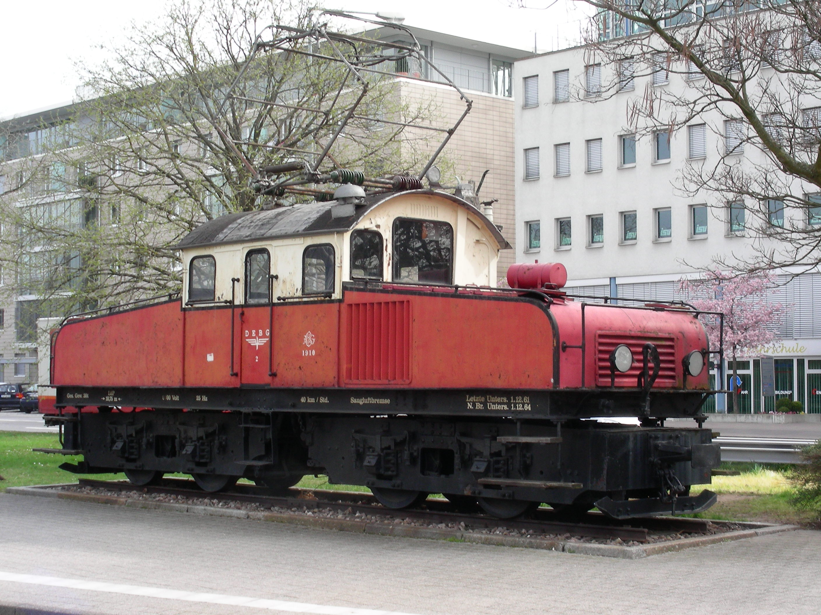 Denkmallok der Albtalbahn Karlsruhe